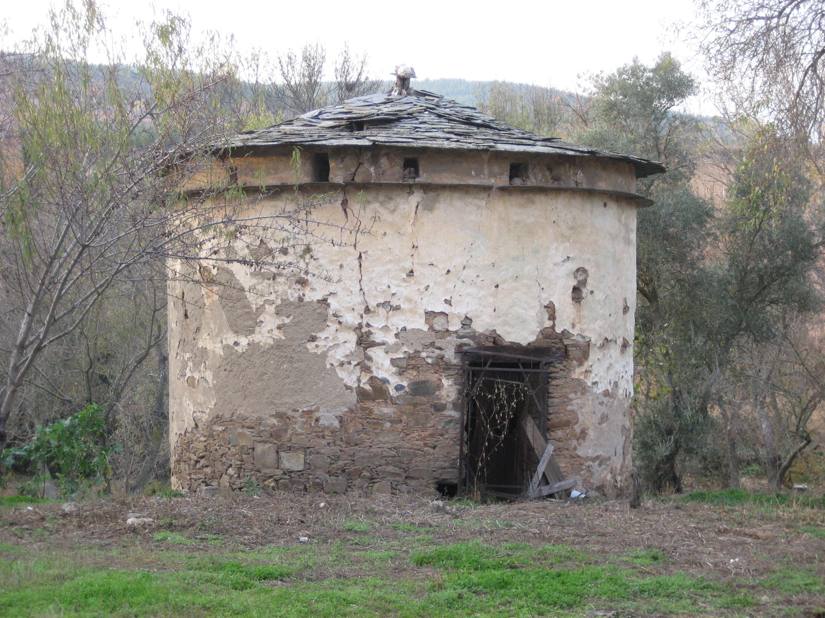 Palomar de los Carujo en San Lorenzo del Bierzo (León, España).